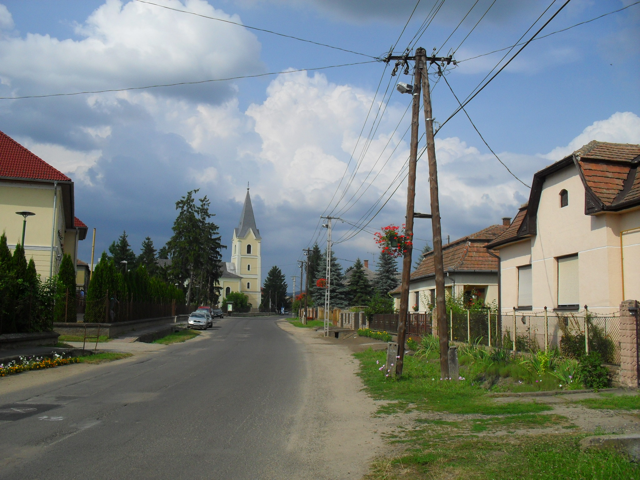 Ludányhalászi - utcakép